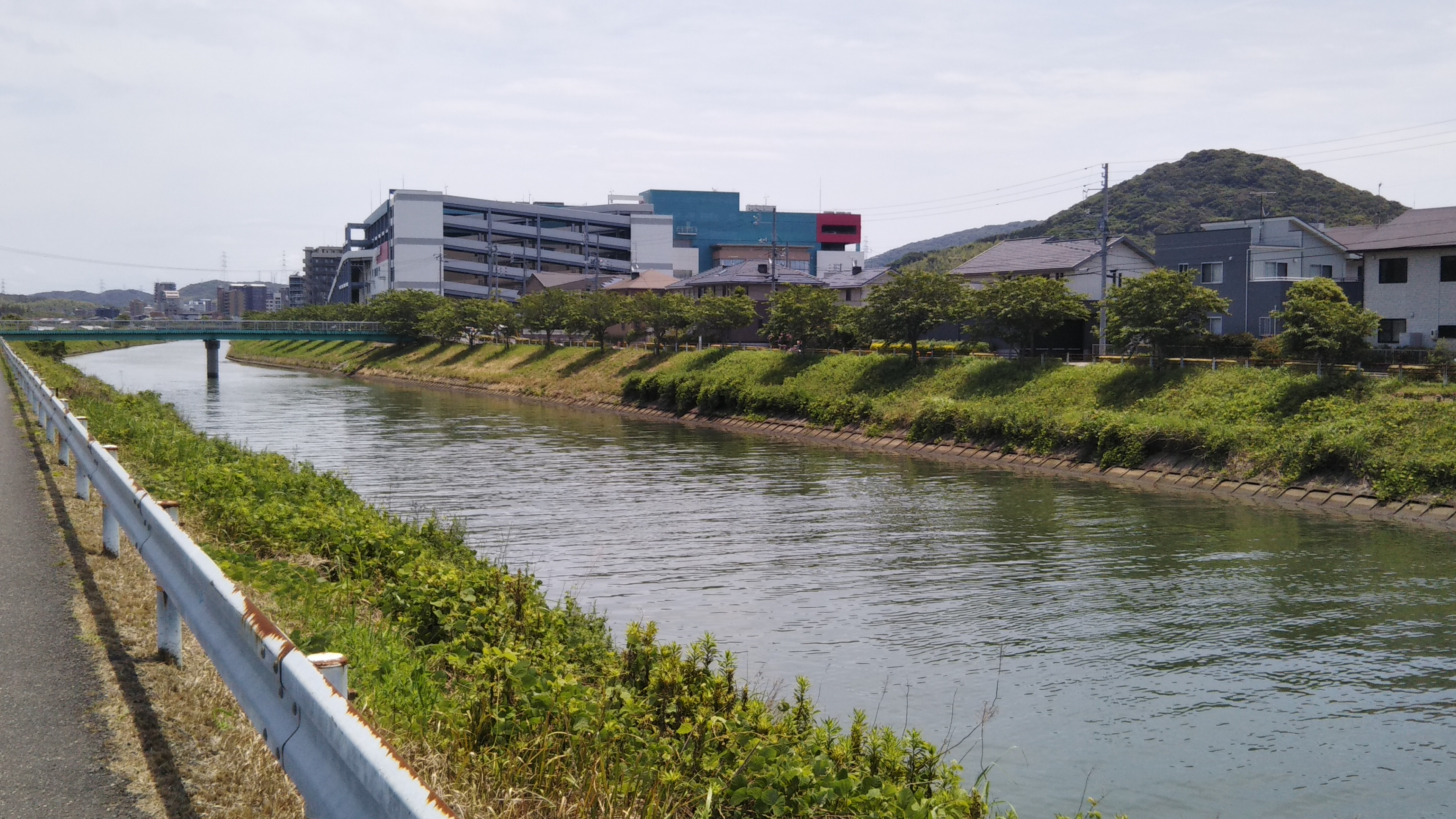 下関市綾羅木川下流付近。